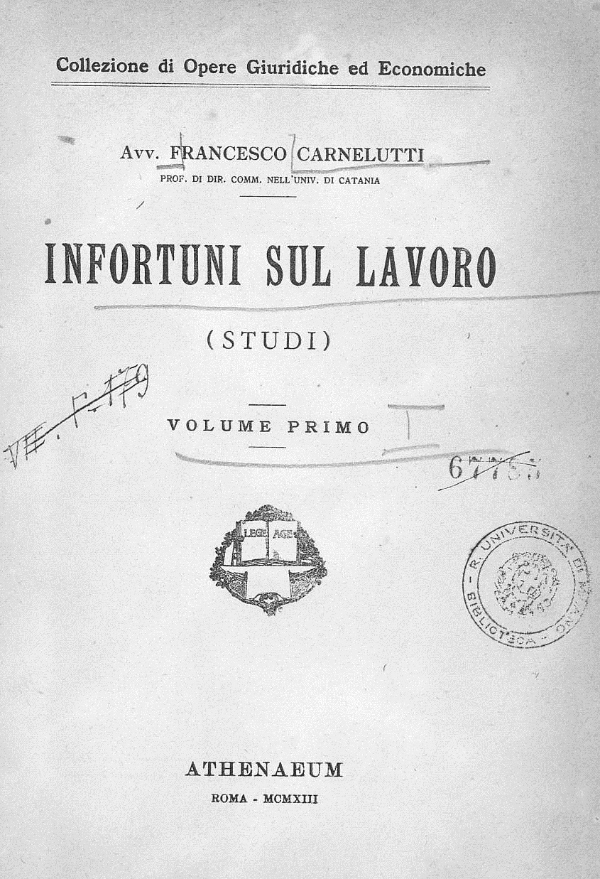 Frontespizio